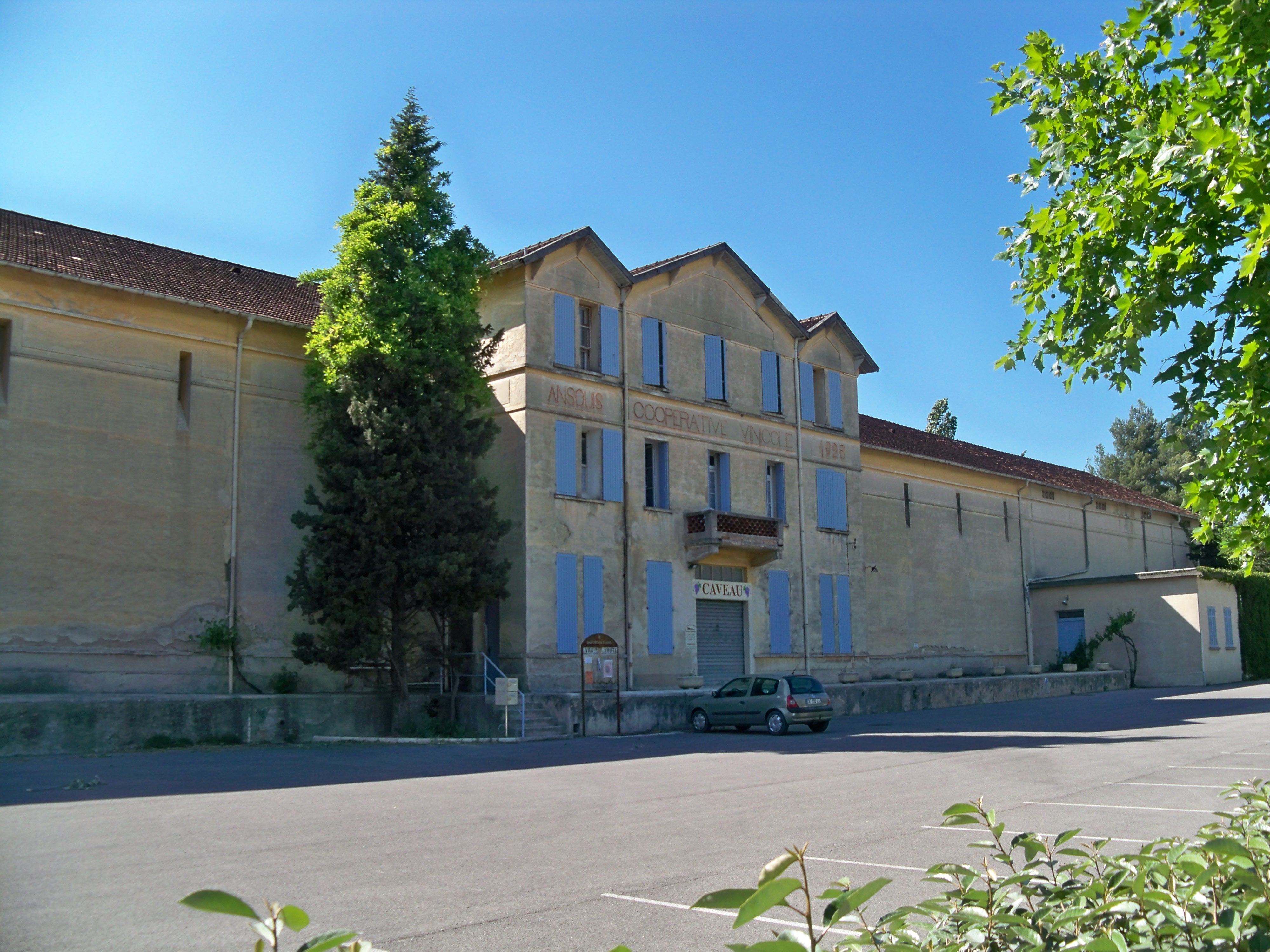 Cave coopérative vinicole d'Ansouis, Vaucluse, France